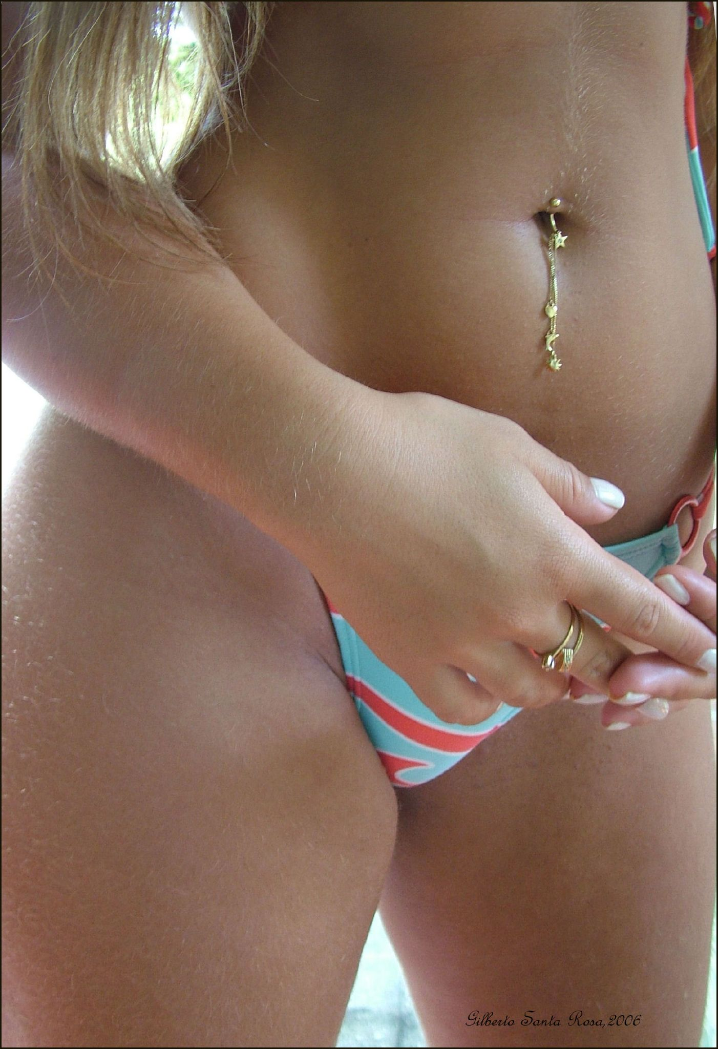 Umbilical piercing.